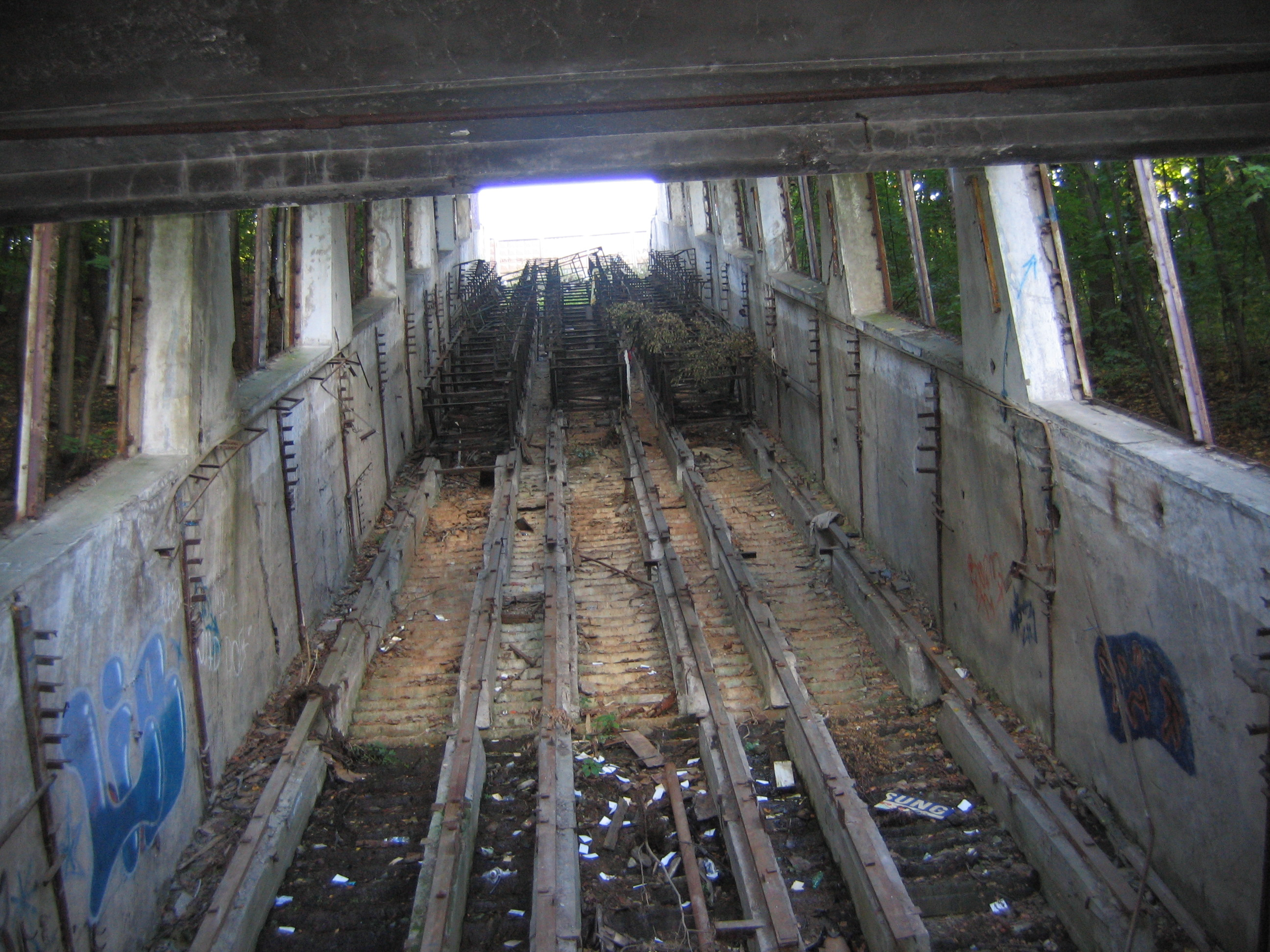 Развалины эскалатора, связывавшего станцию Московского метро «Воробьёвы горы» с улицей Косыгина.